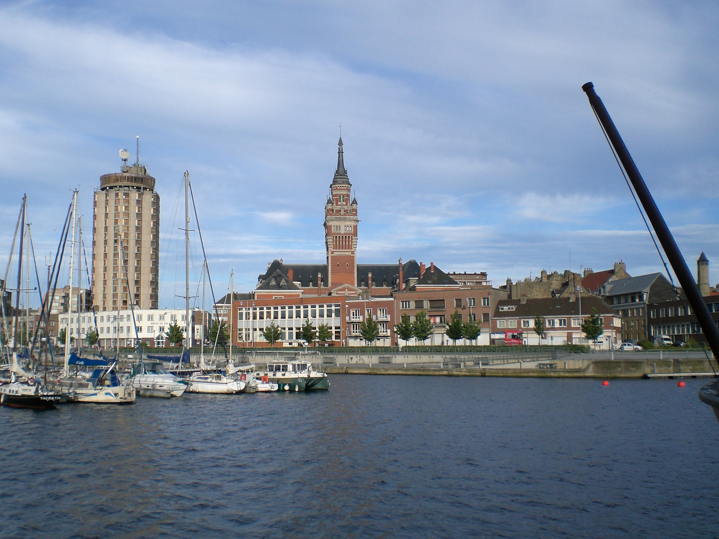 Ville de Dunkerque vue du port de plaisance.